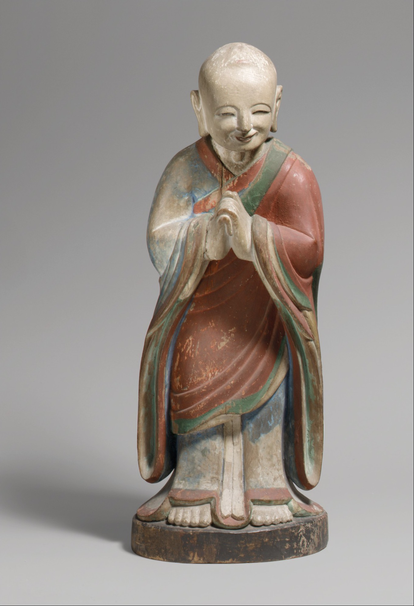 Korea; Figure; Sculpture